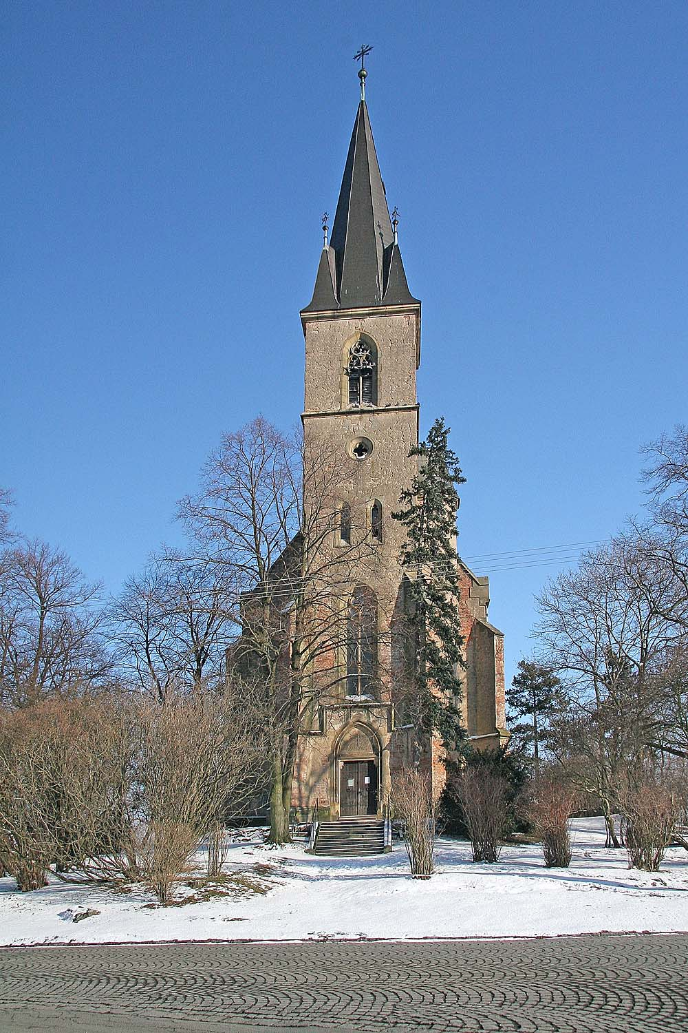 Kostel Svatého Jiří v obci Lošany v okrese Kolín autor: Prazak date: 27. 2. 2006